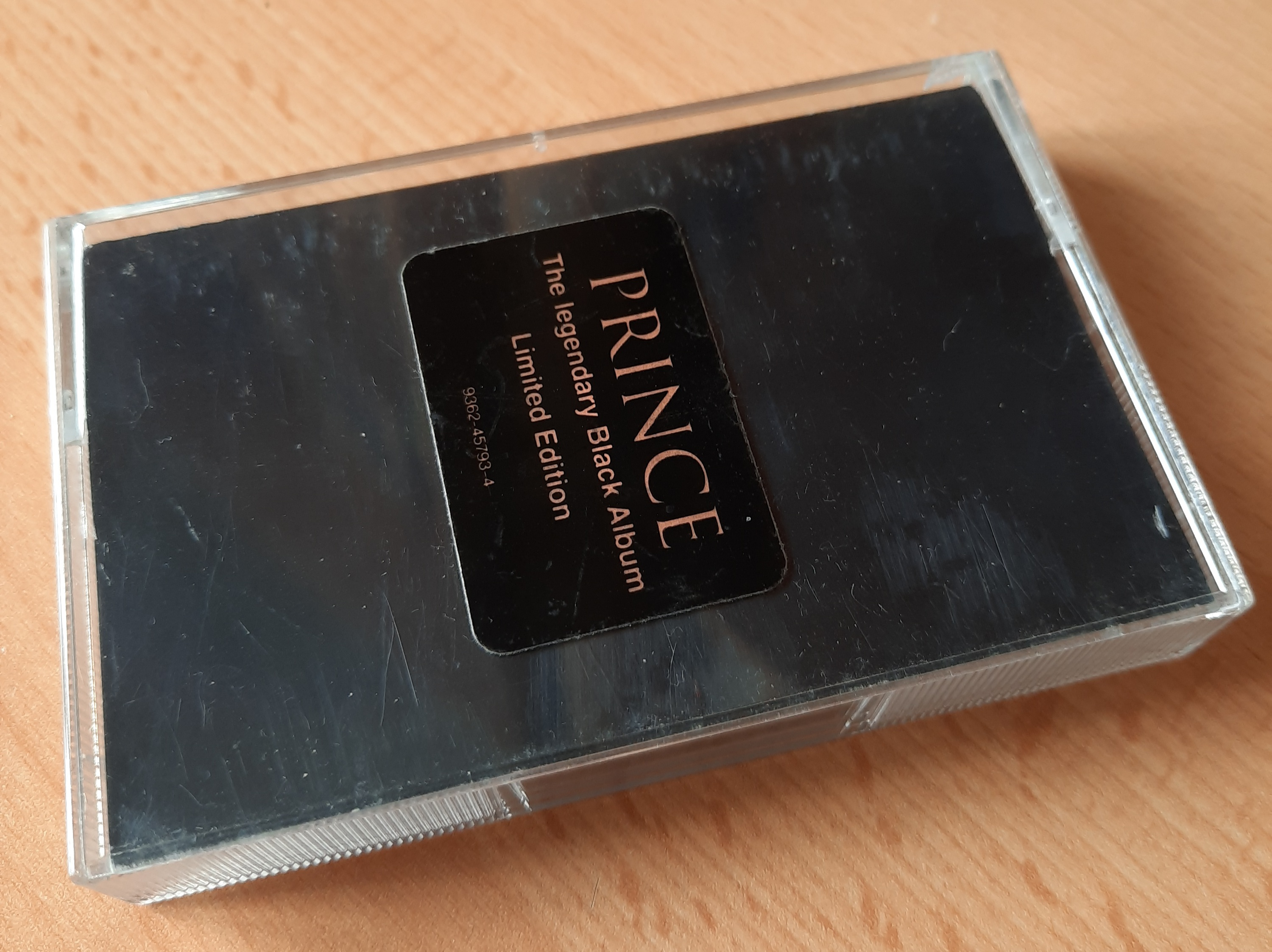 Касета Чорного Альбому американського музиканта Прінса